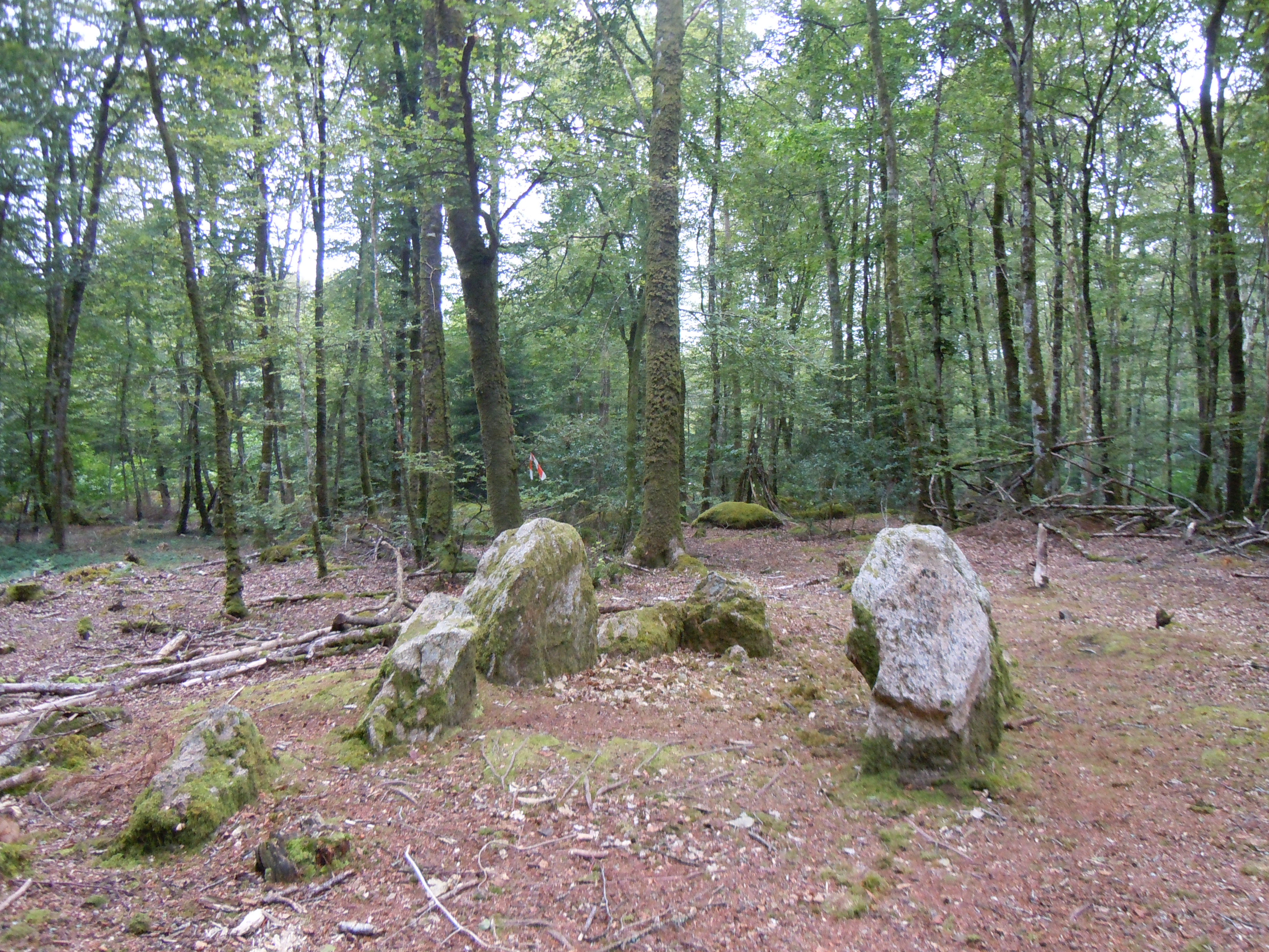 Dolmen de Toulfoën dans la forêt de Carnoët à Quimperlé (Finistère)